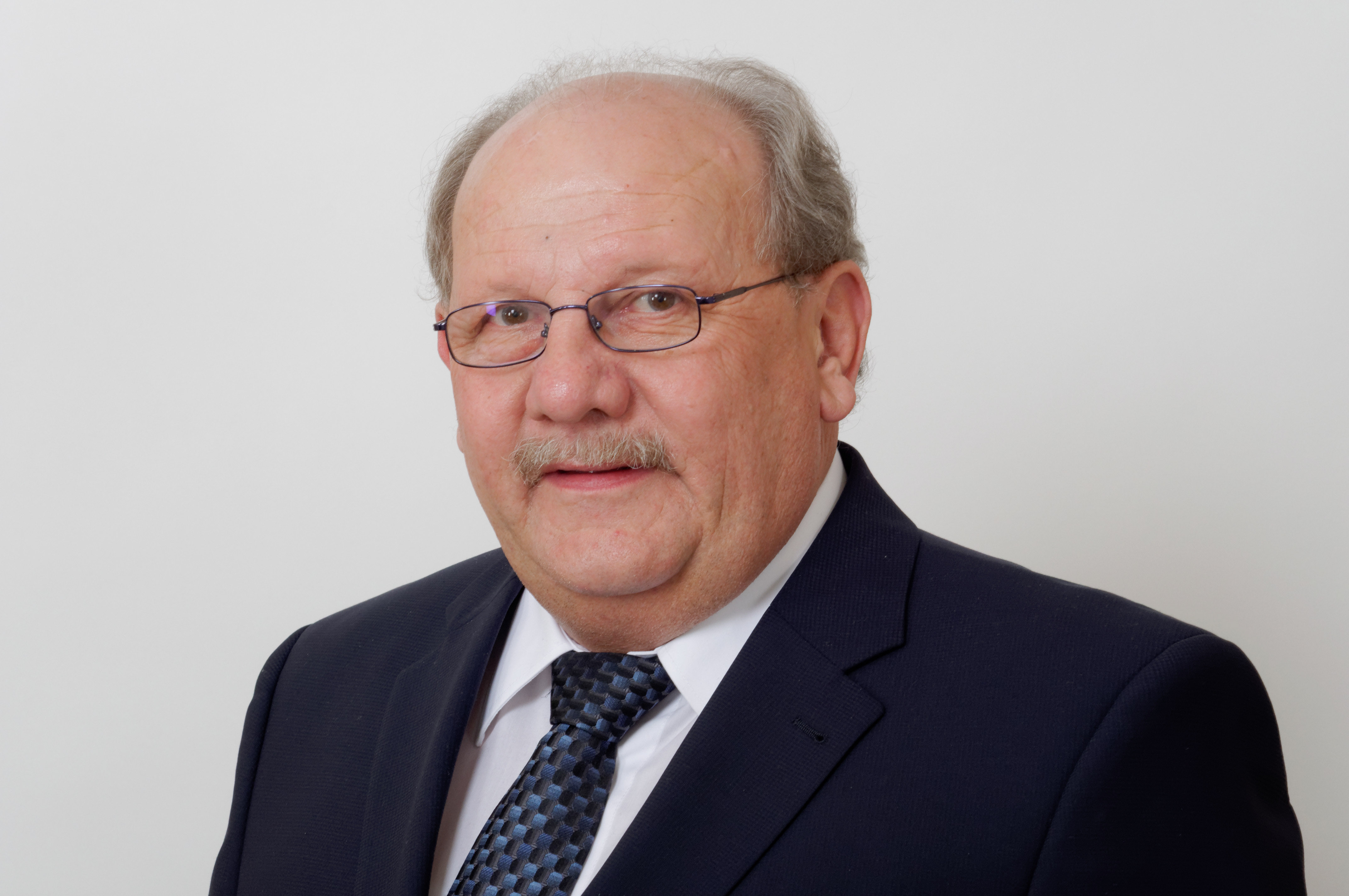 Landtagsprojekt Hessen